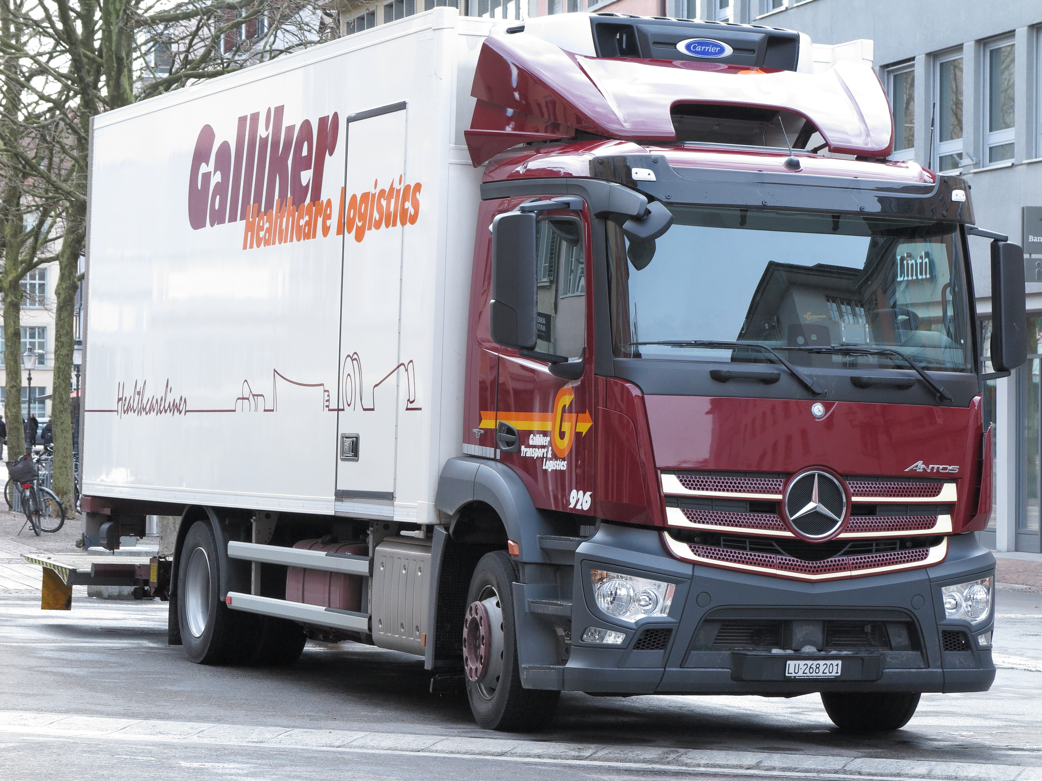 Mercedes-Benz Antos bei der Warenanlieferung in Winterthur